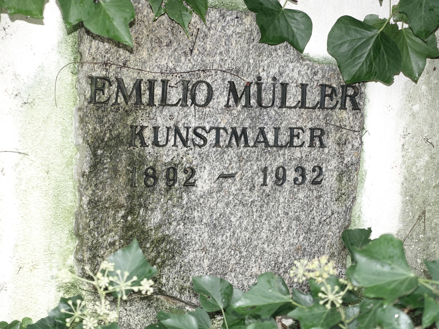 Emilio Müller (1892–1932) Kunstmaler, Friedhof Sissach